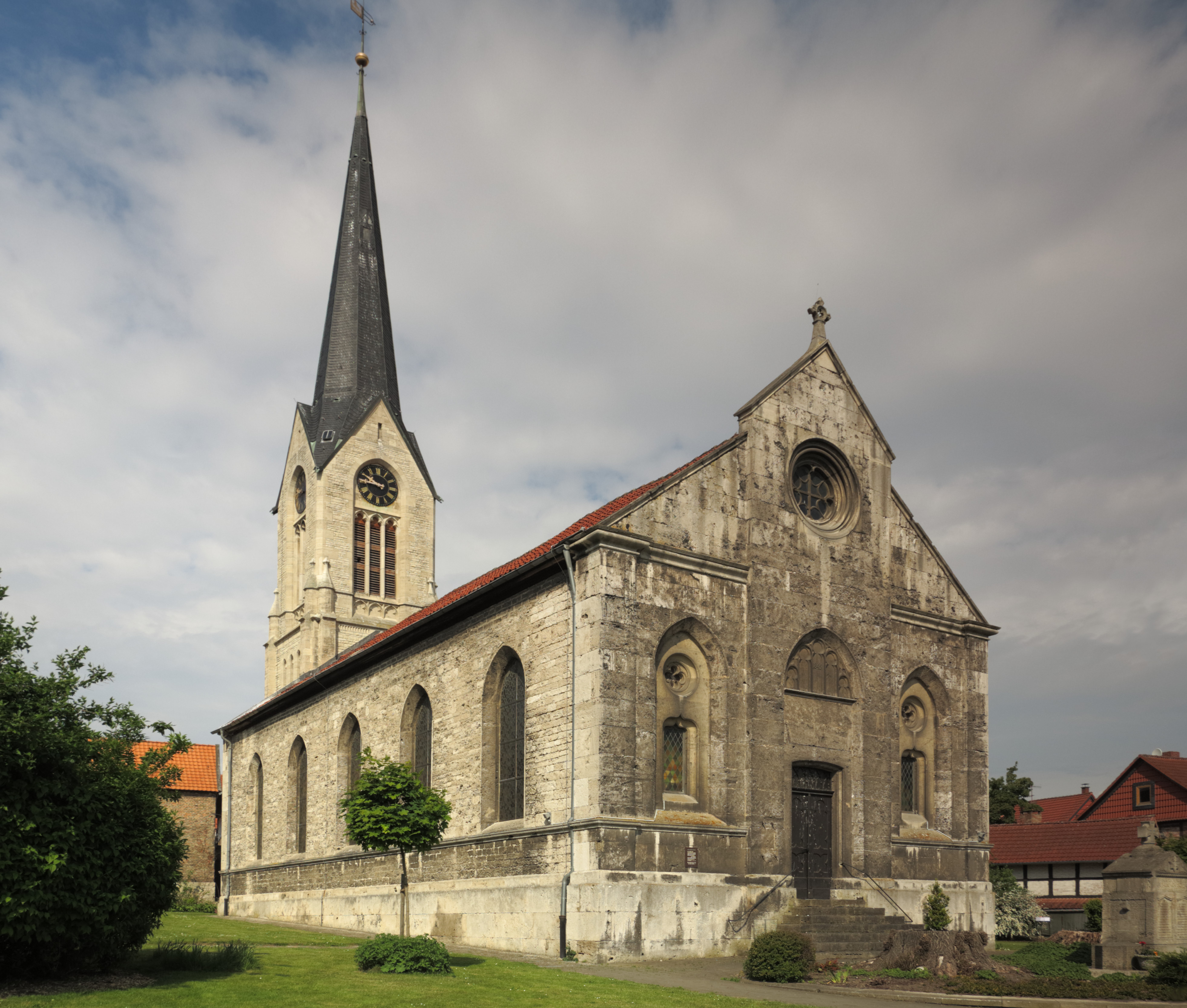 Die evangelisch-lutherische St. Maria-Kirche in Lelm (Ortsteil Königslutter)